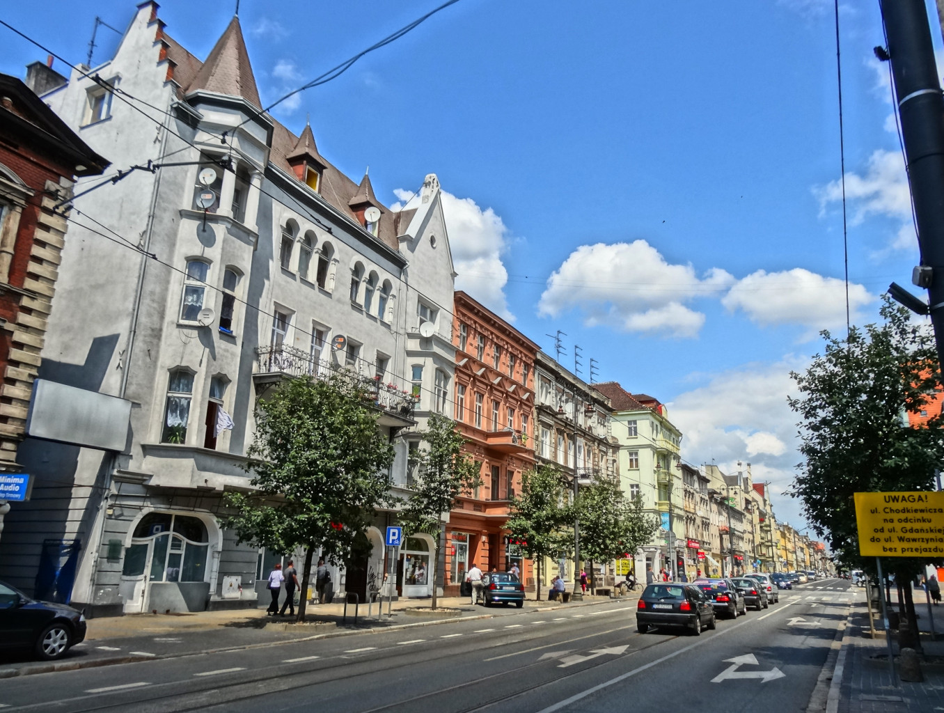 Ulica Gdańska w Bydgoszczy na odcinku od ul. Cieszkowskiego do ul. Świętojańskiej